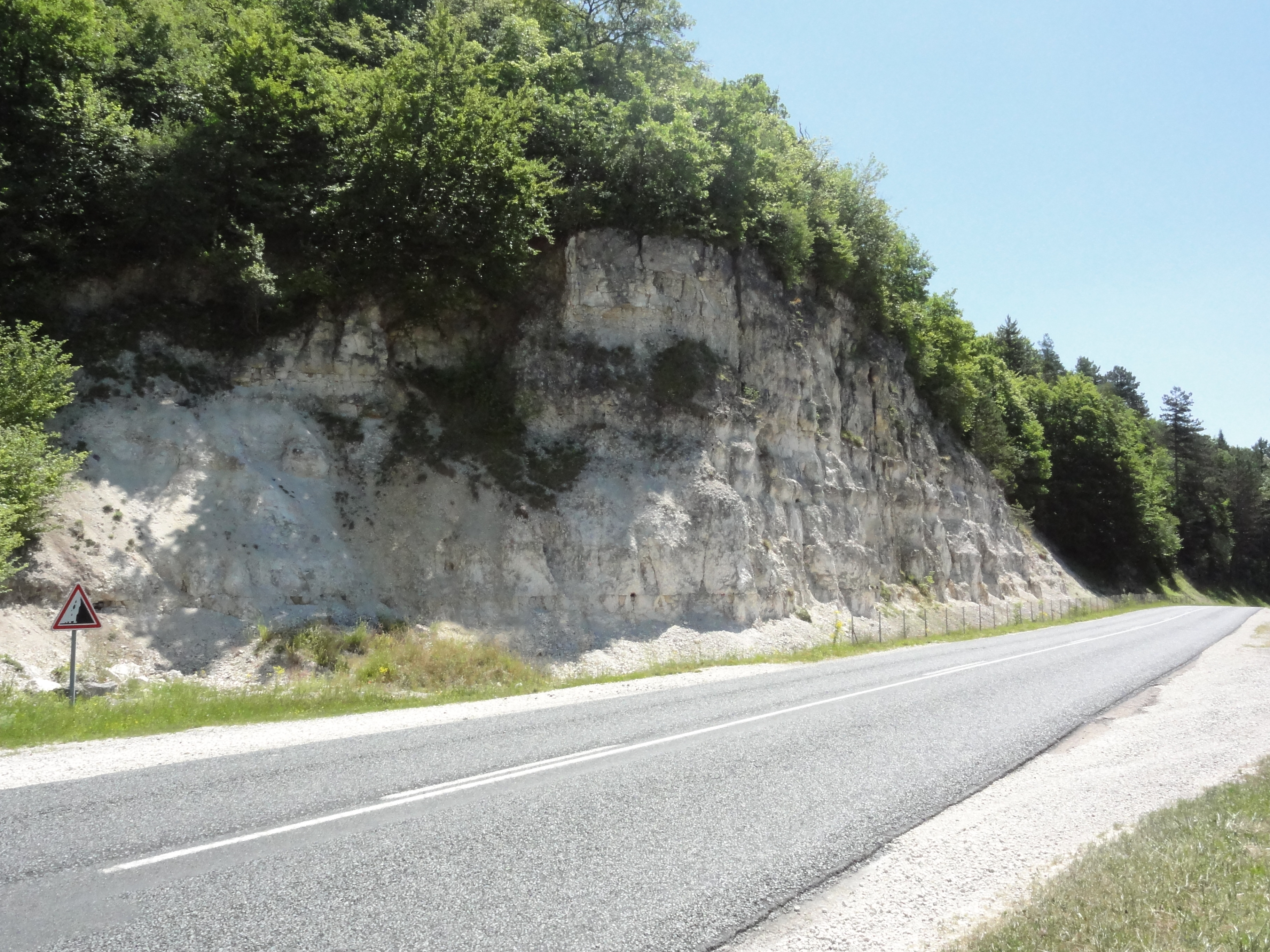 Doulaincourt-Saucourt, D67a roche à nue au-dessus de la Combe de Presle